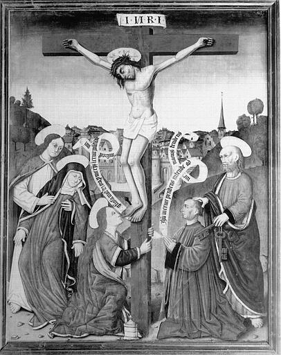 Gemälde auf Holz in der Kirche Sainte-Croix in Gannat